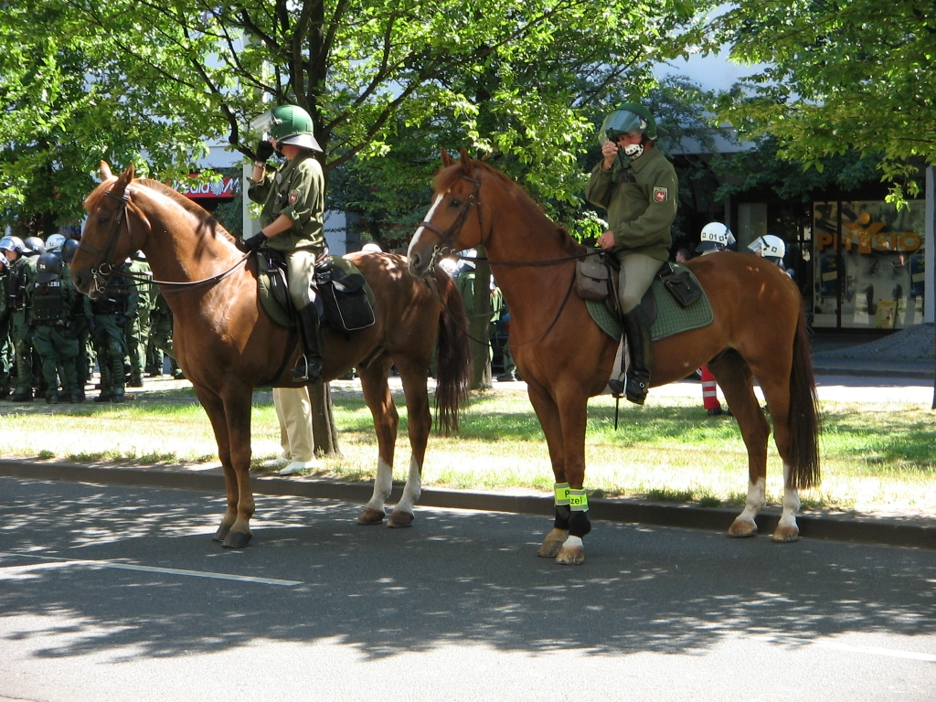 Berittene Polizei bei einer NPD-Demo in Braunschweig am 19. Juni 2005